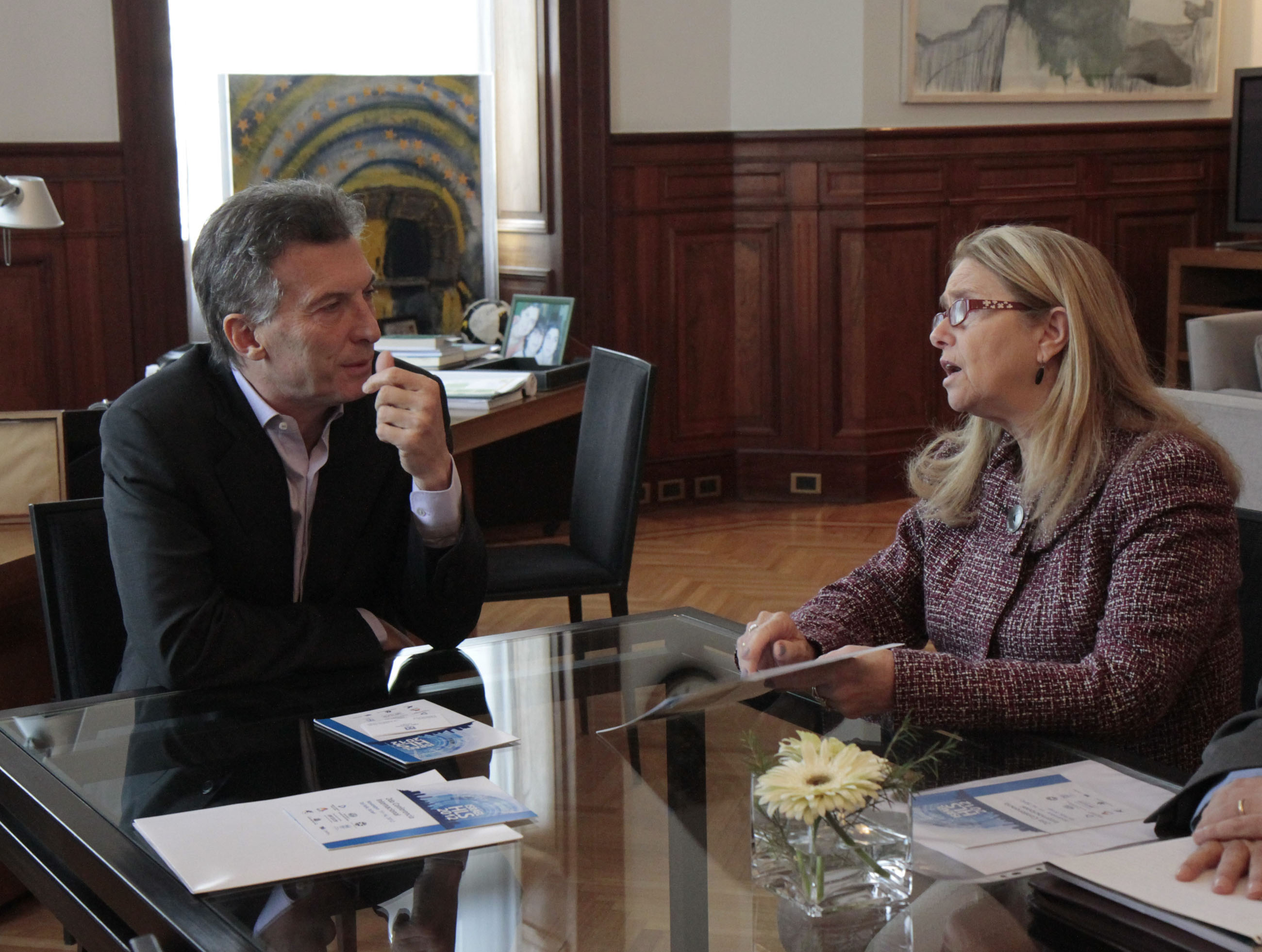 Buenos Aires. Setiembre 3 de 2012. El Jefe de Gobierno porteño, Mauricio Macri, recibe en su despacho del Palacio de Gobierno a la embajadora de Israel, Dorit Shavit, en la mañana de hoy.- Foto Mariana Sapriza-gv/GCBA.